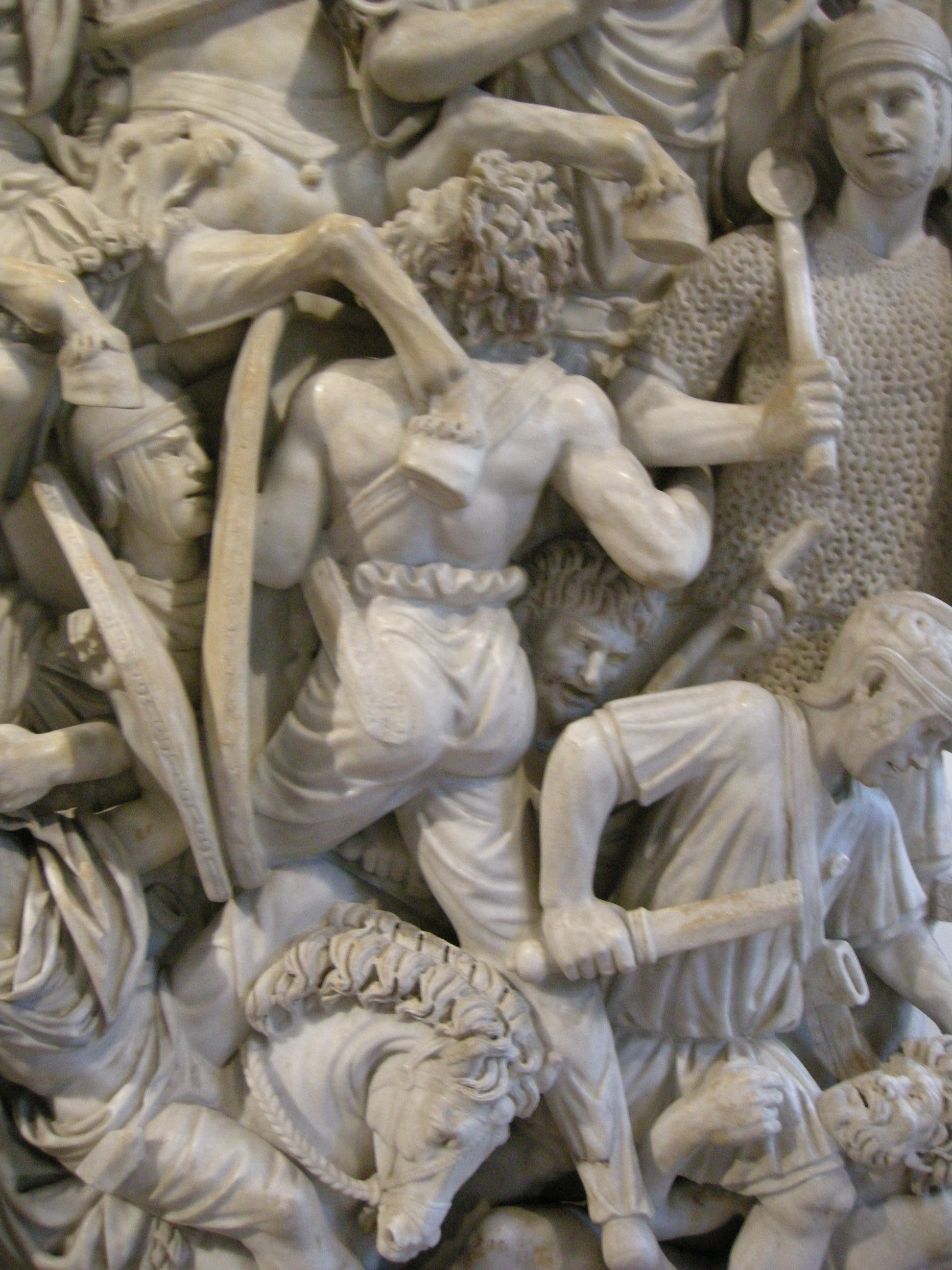 Grande Ludovisi sarcophagus